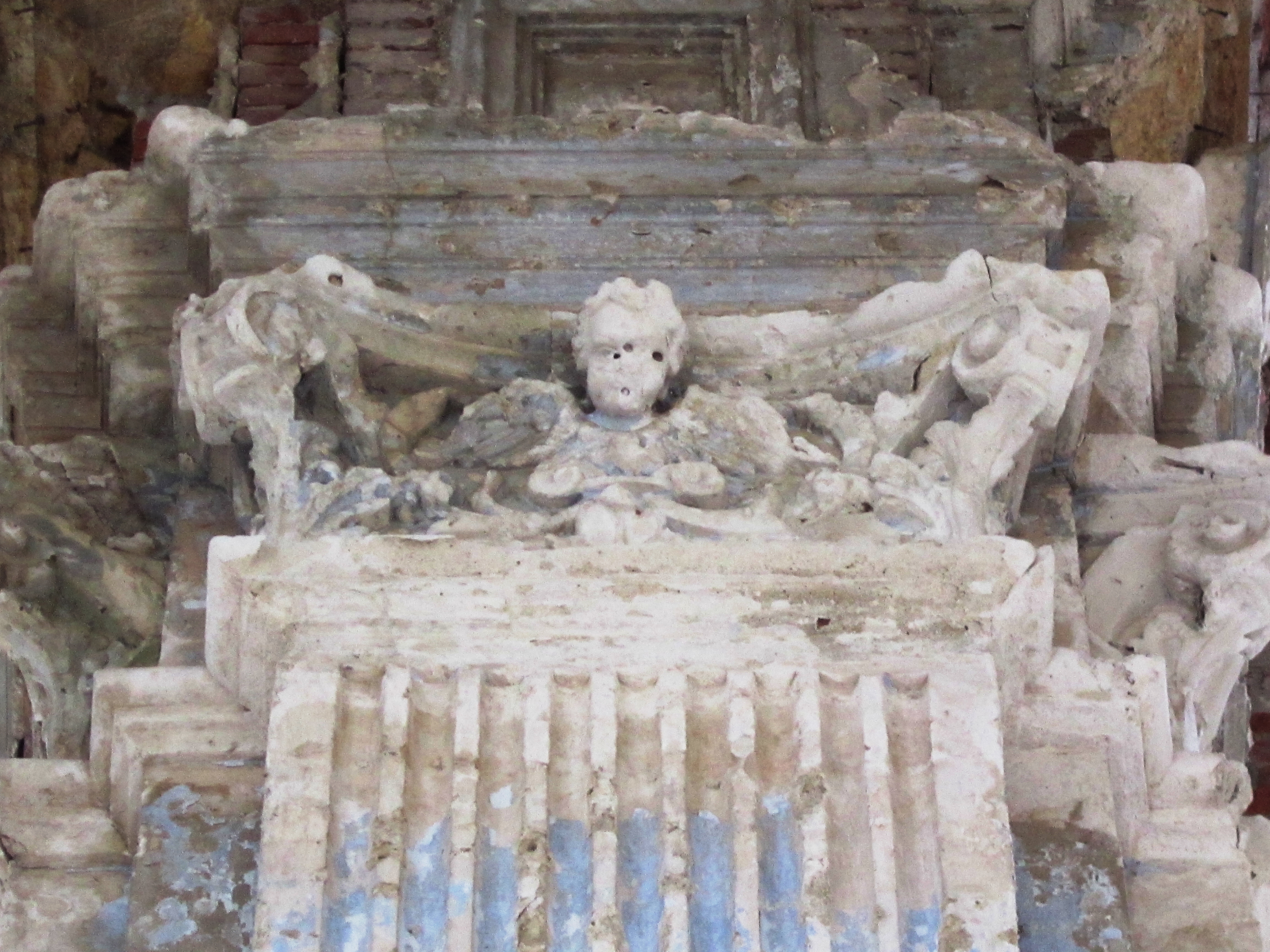 Кірха, смт. Лиманське (колишня колонія Зельц), Роздільнянський район, Одеська область, 1901 рік.